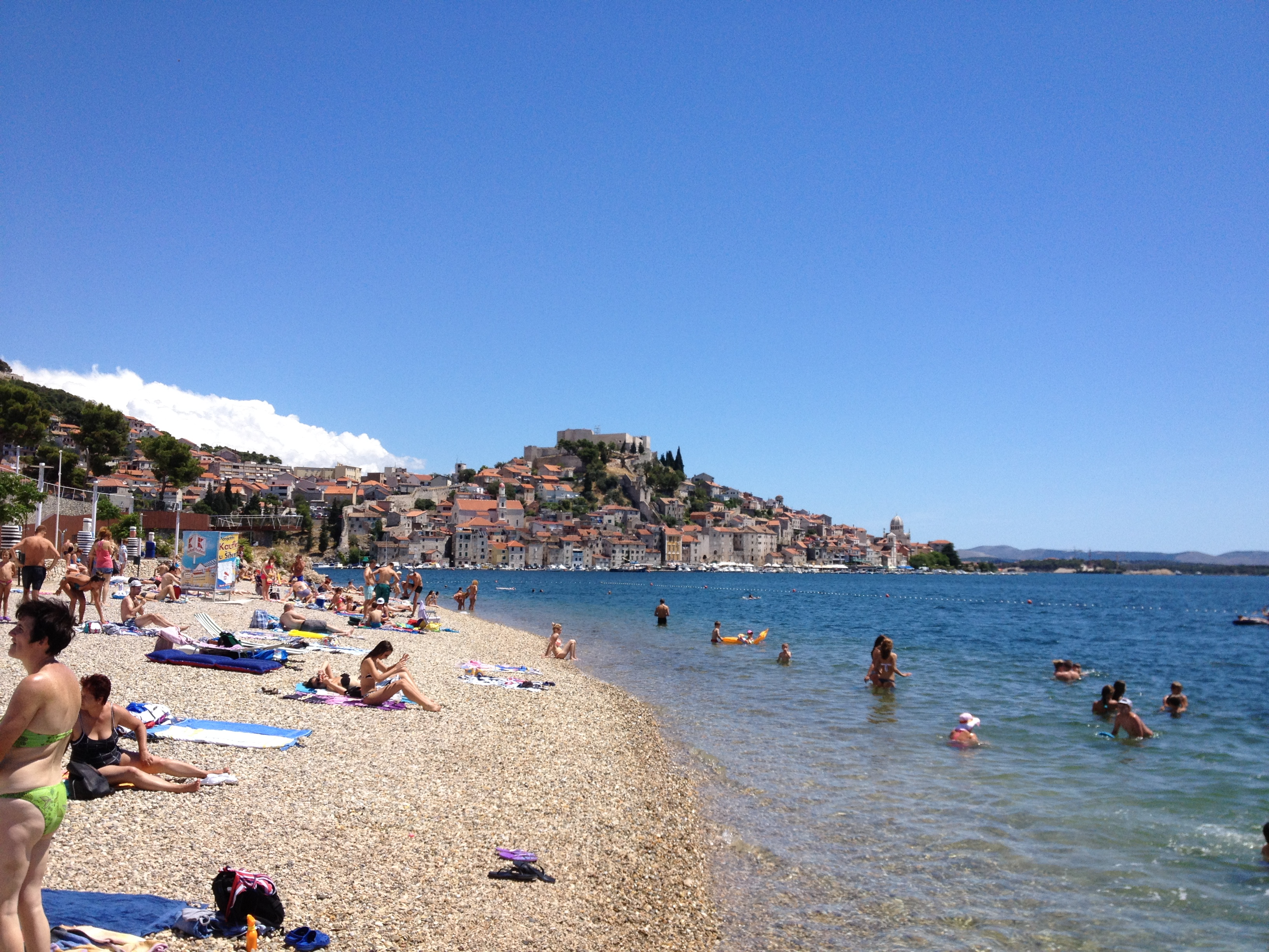 Šibenik, Croatia